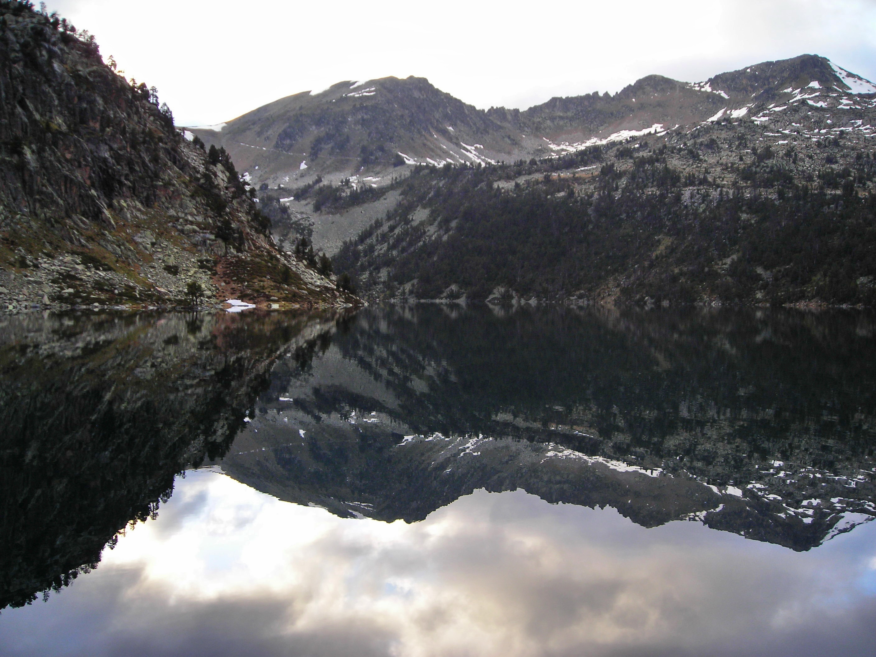 Lac d'Aubert